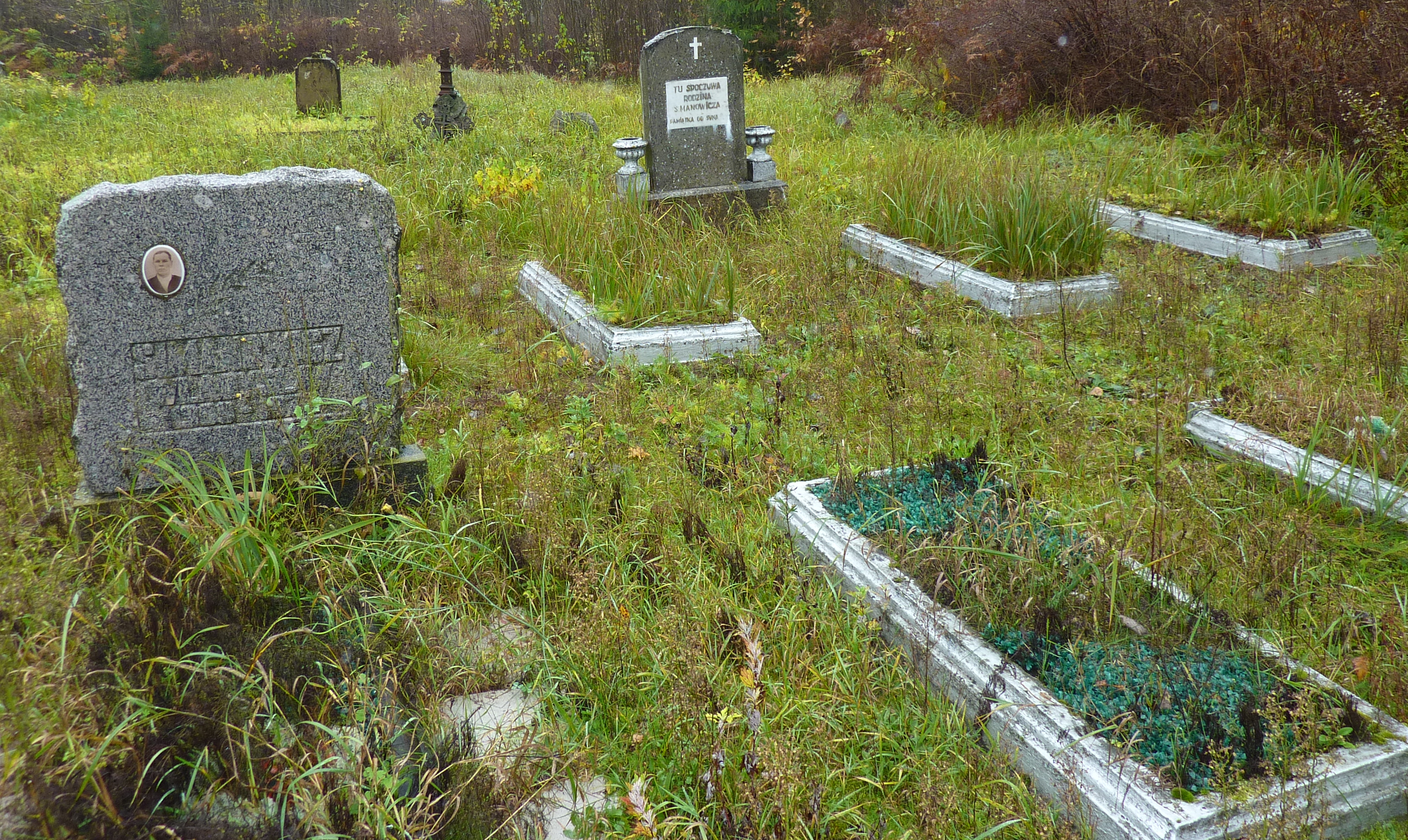 Cmentarz w Rybiniszkach